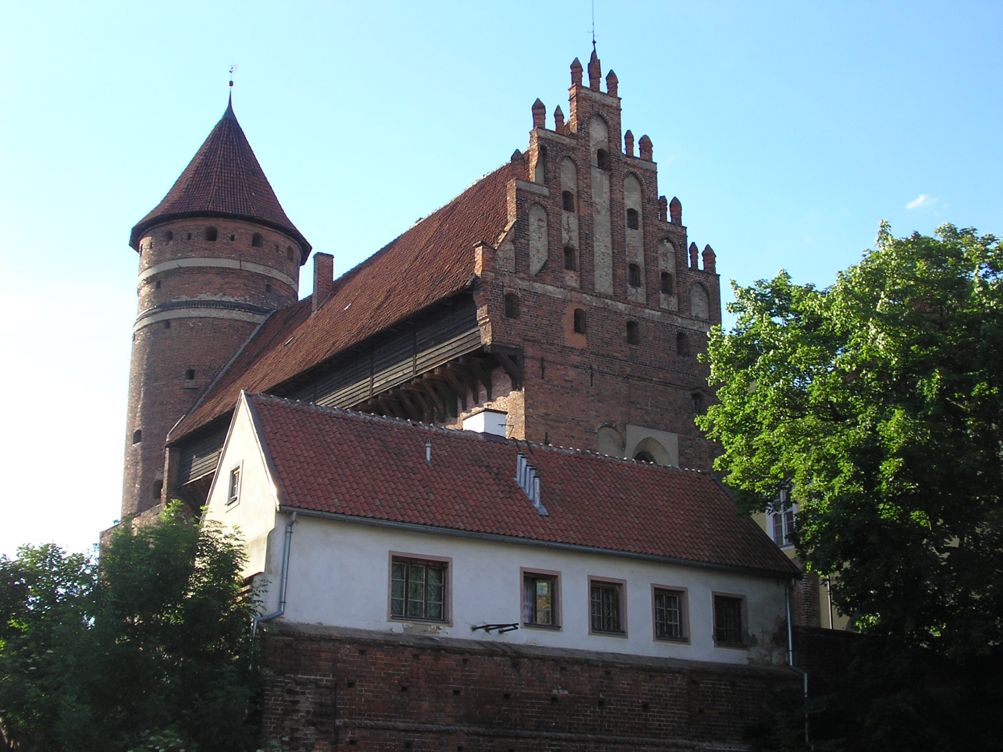 Zamek Olsztyński